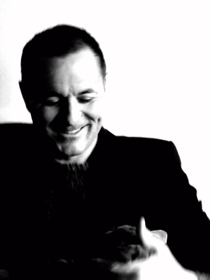 Der Autor René Steininger mit Katze